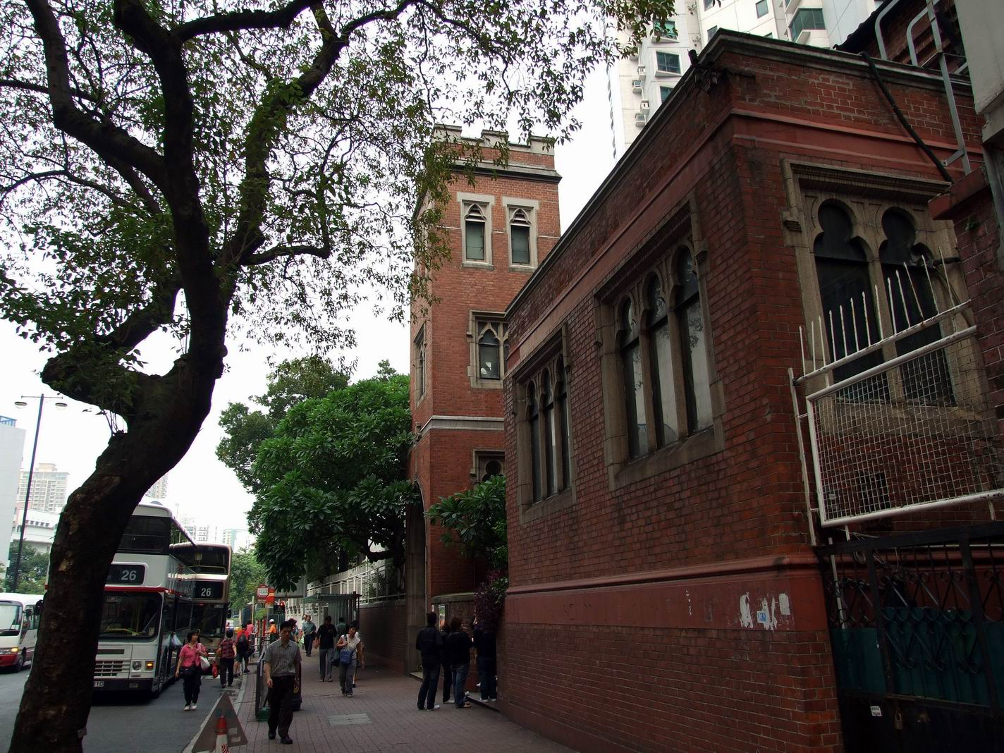 九龍佑寧堂